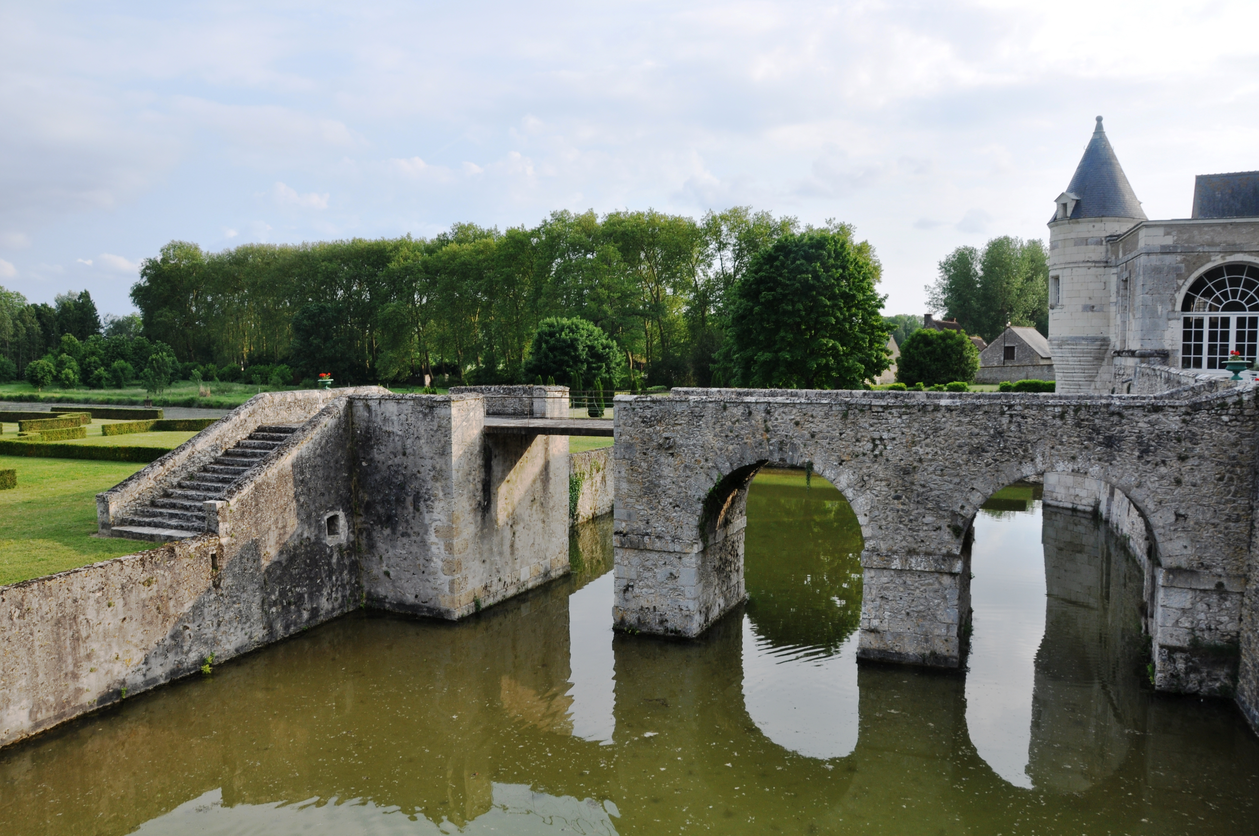 Douve Château de Saint Denis sur Loire